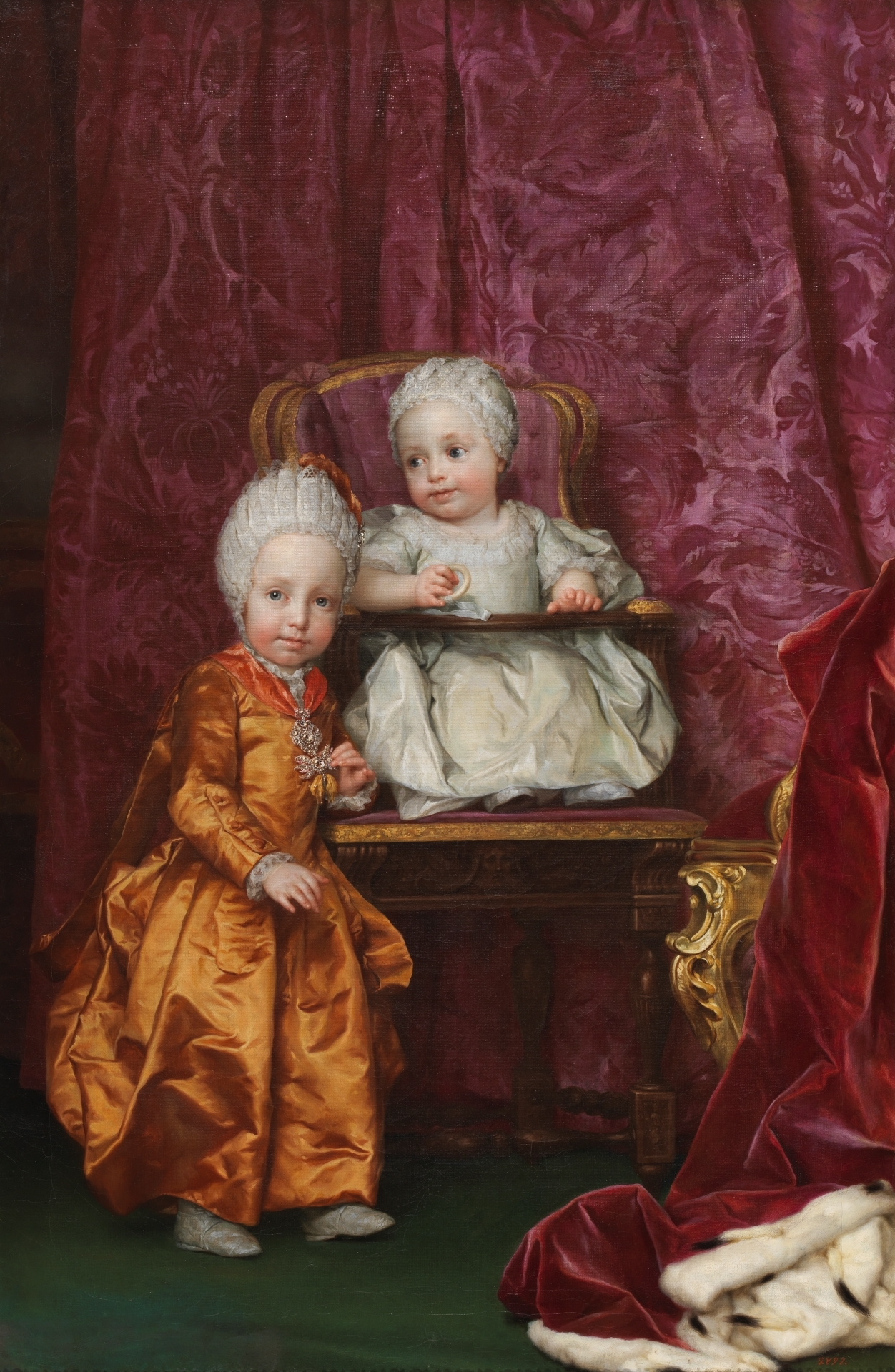 Retrato de los archiduques Fernando III de Toscana (1769-1824) y María Ana Fernanda de Austria (1770-1809), que fueron hijos del emperador Leopoldo II del Sacro Imperio Romano Germánico y de la emperatriz María Luisa de Borbón.